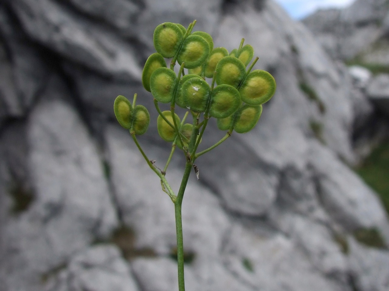 Biscutella laevigata (fruits)